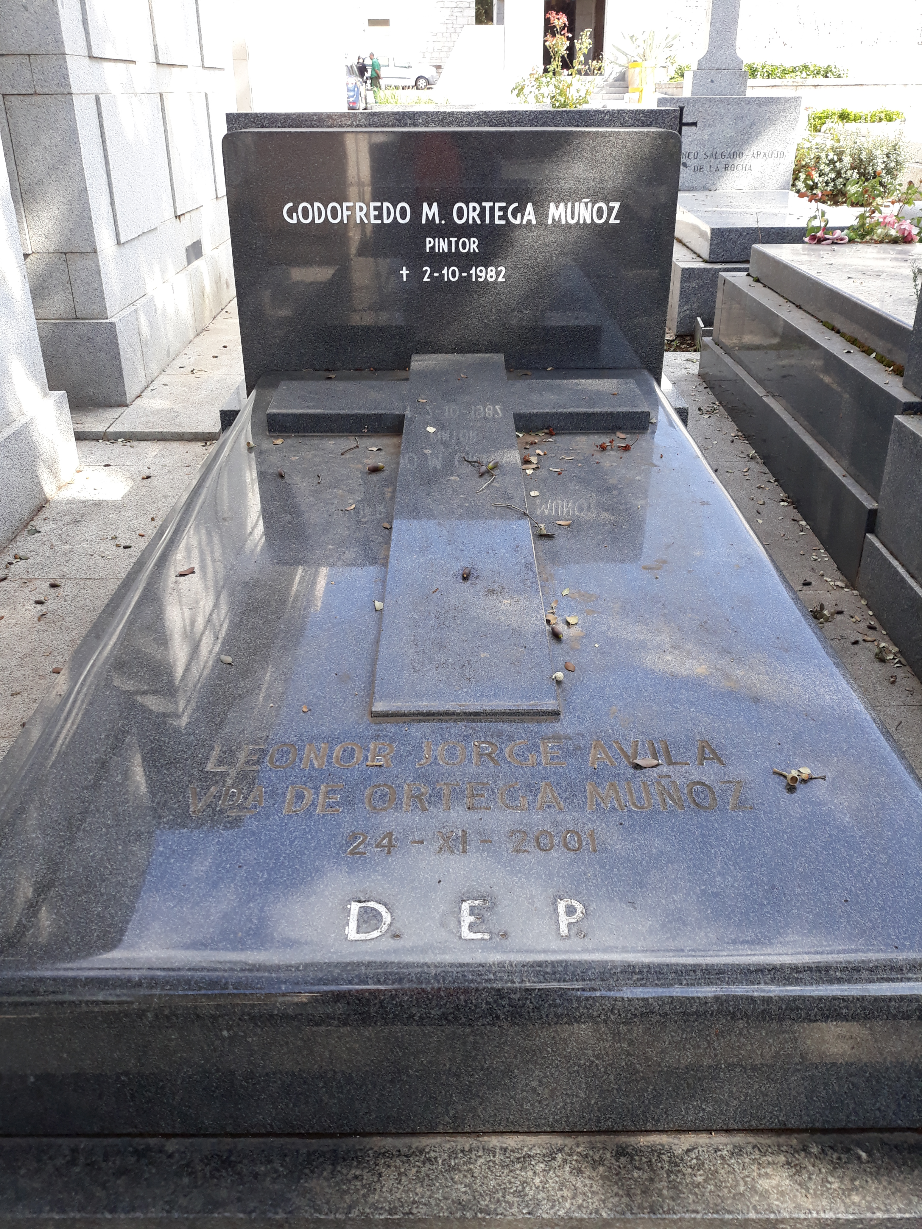 Das Grab des spanischen Malers Godofredo Ortega y Munoz auf dem Mingorrrubio-Friedhof in Madrid-El Pardo.